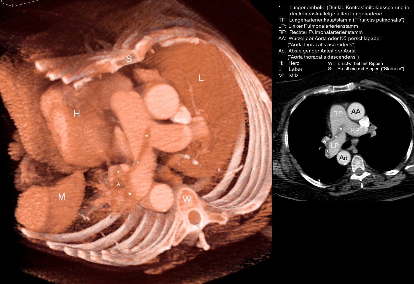 Lungenembolie im CT-Schnittbild Links rekonstruiertes 3D-Bild , rechts Einzelschicht in Schnittebene der Embolie